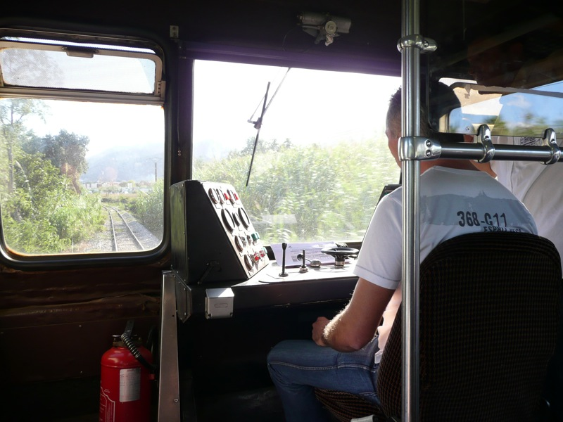 Chemin de fer Corse dans la cabine d'un X 5000 entre Bastia et Ajaccio, France